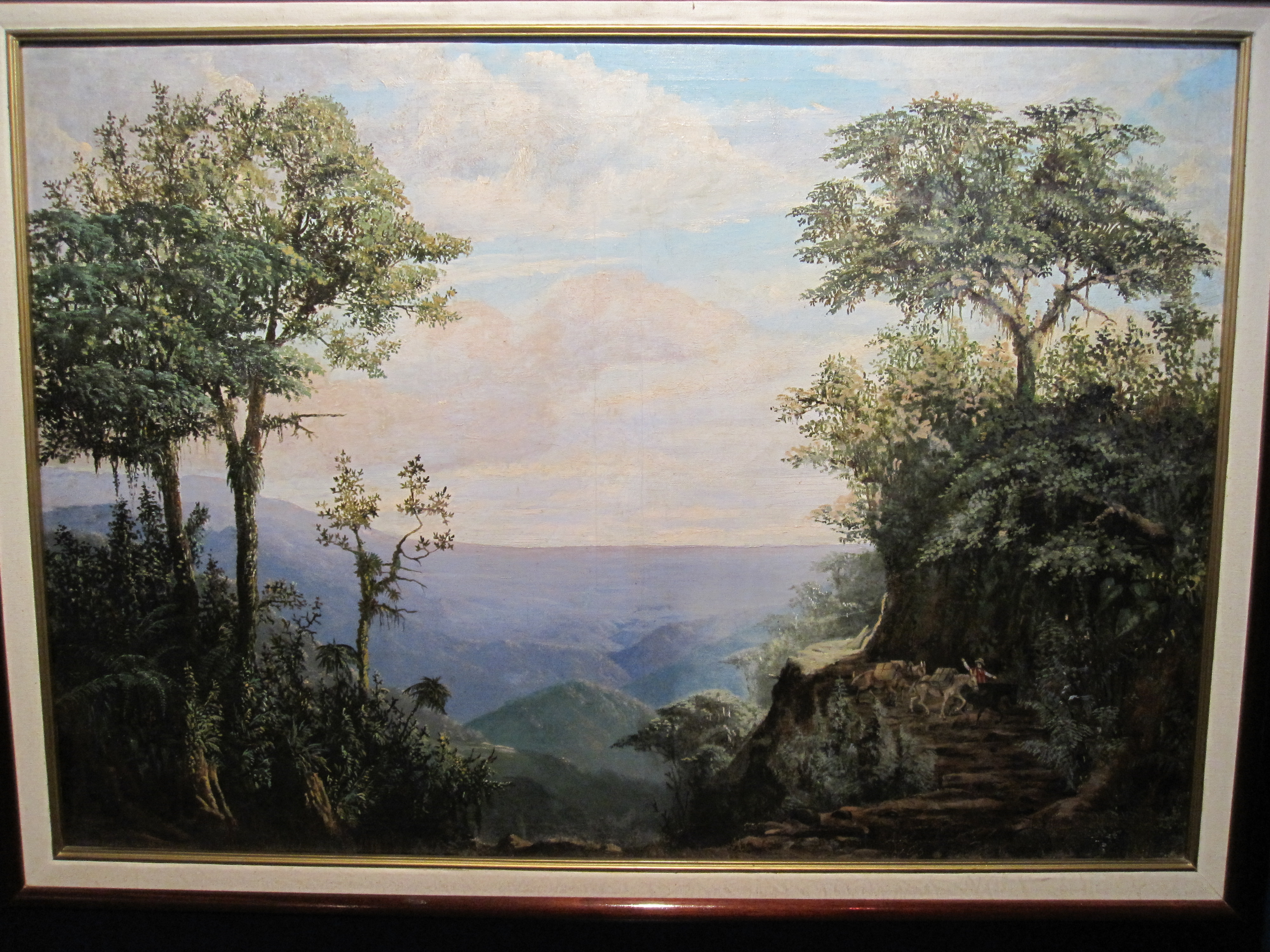 Entrada al Oriente